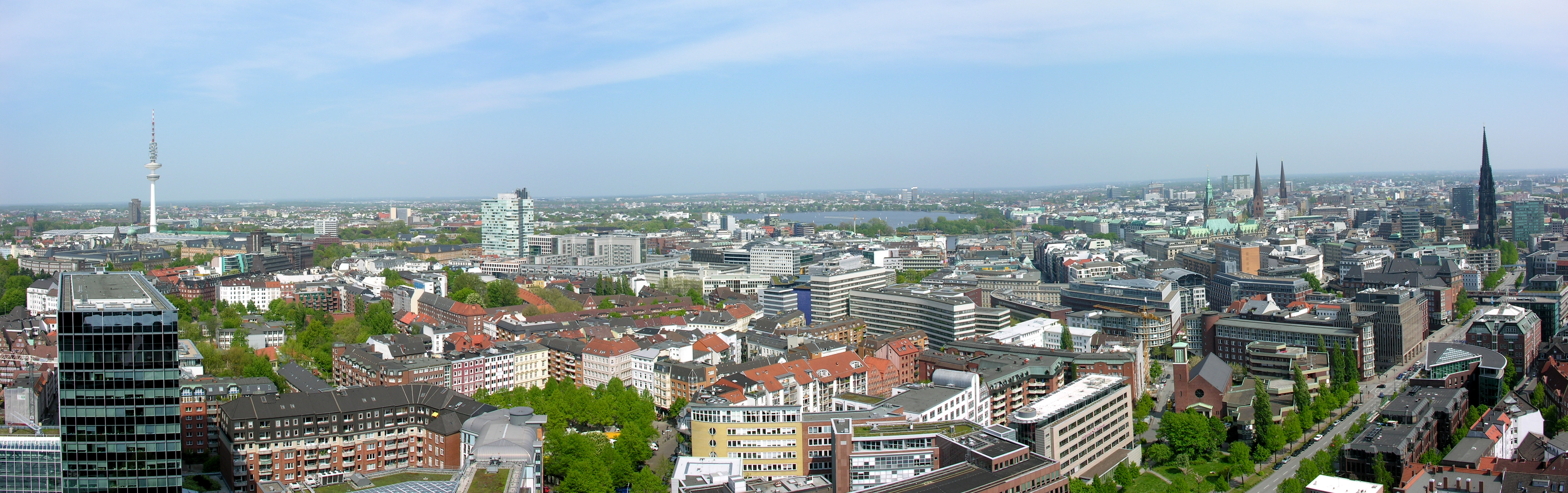 Germany, Hamburg, View from St.-Michaelis-Kirche